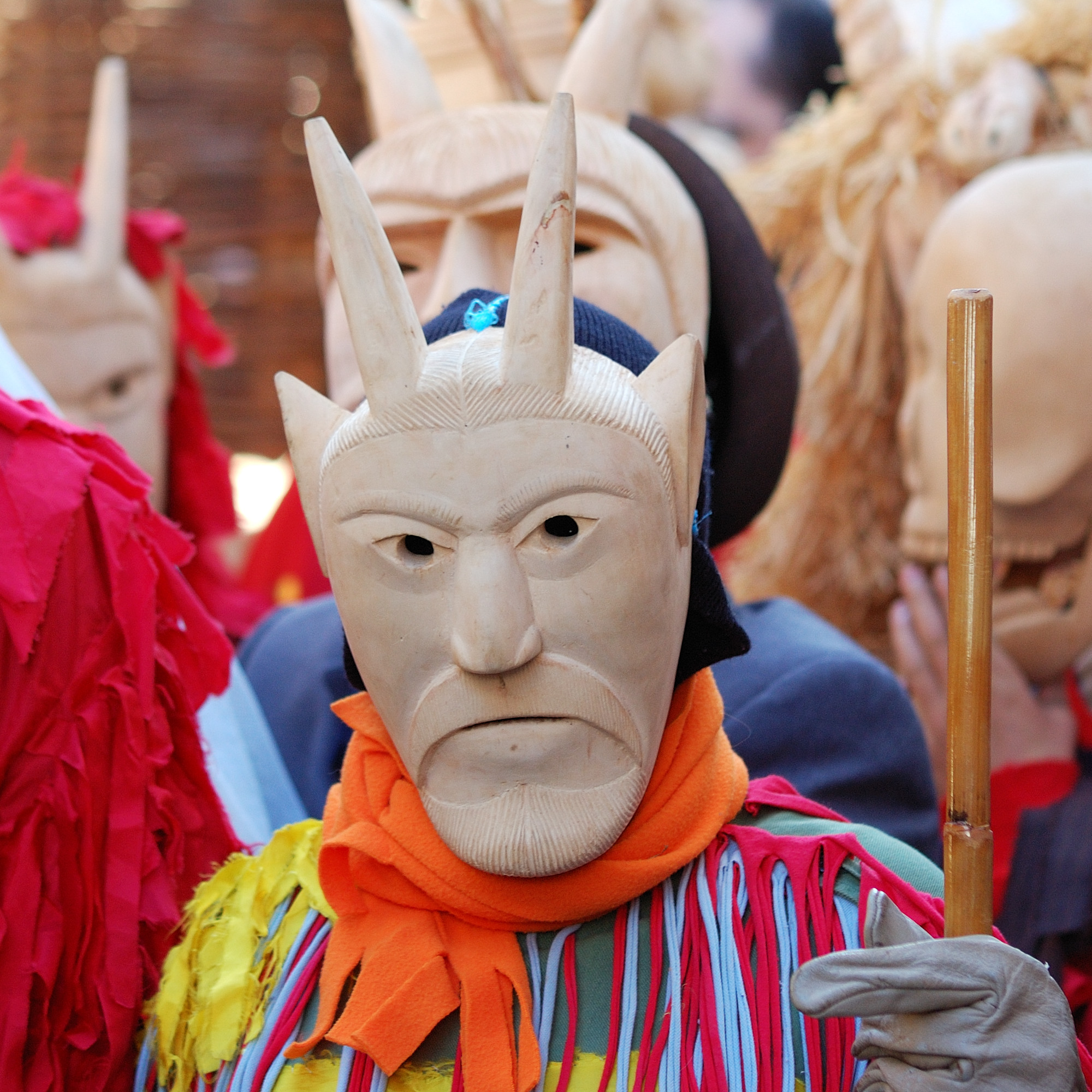 Carnaval de Lazarim, Portugal [2009]